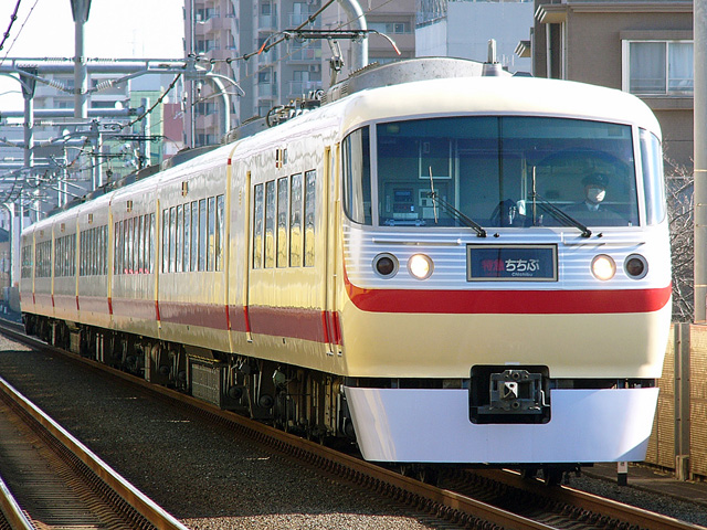 西武10000系「レッドアロークラシック」1月17日、富士見台駅にて撮影